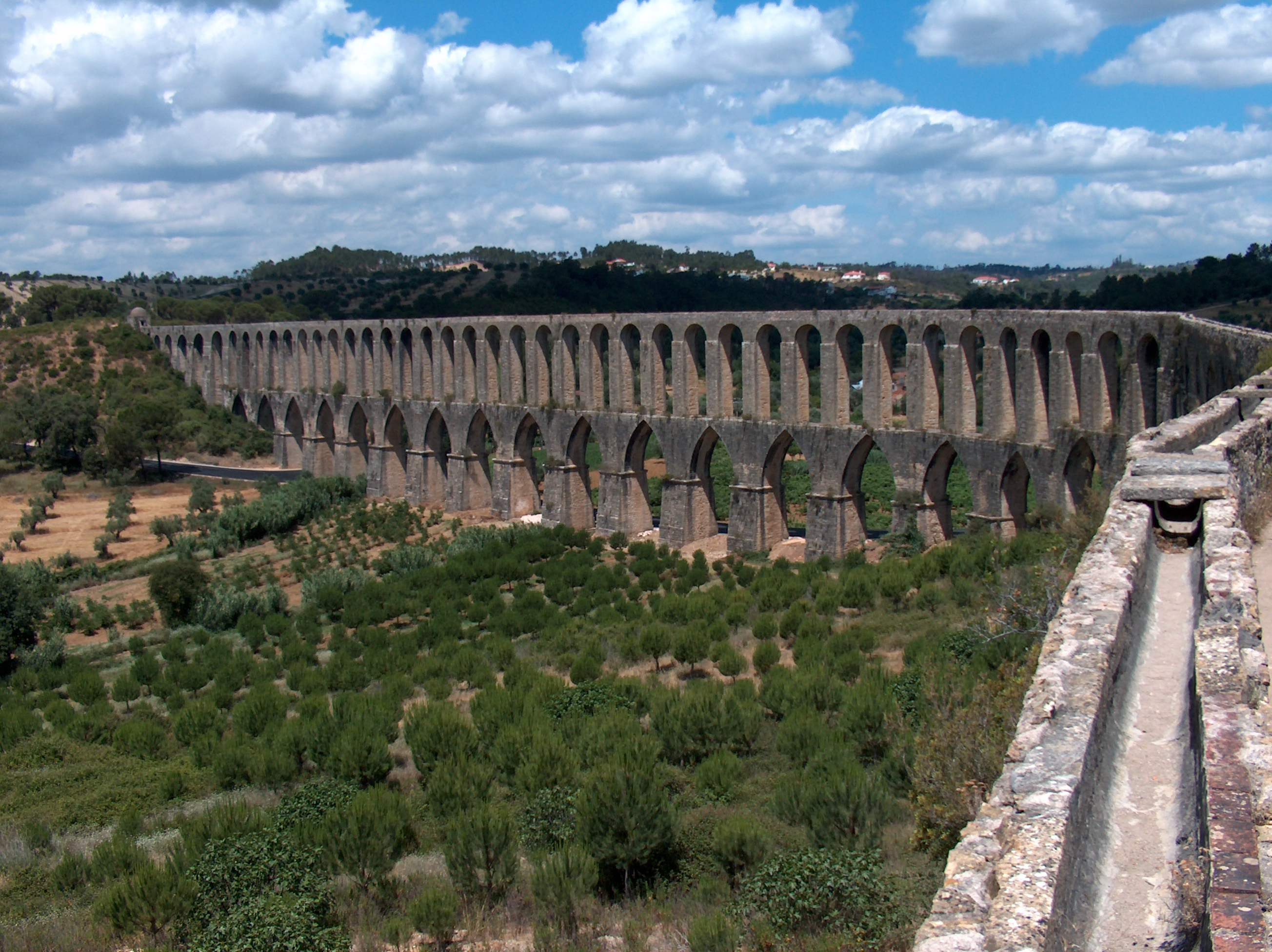 Descrição Vista geral do Aqueduto dos Pegões. Fonte Carregada pelo autor Autor João Carvalho Licença